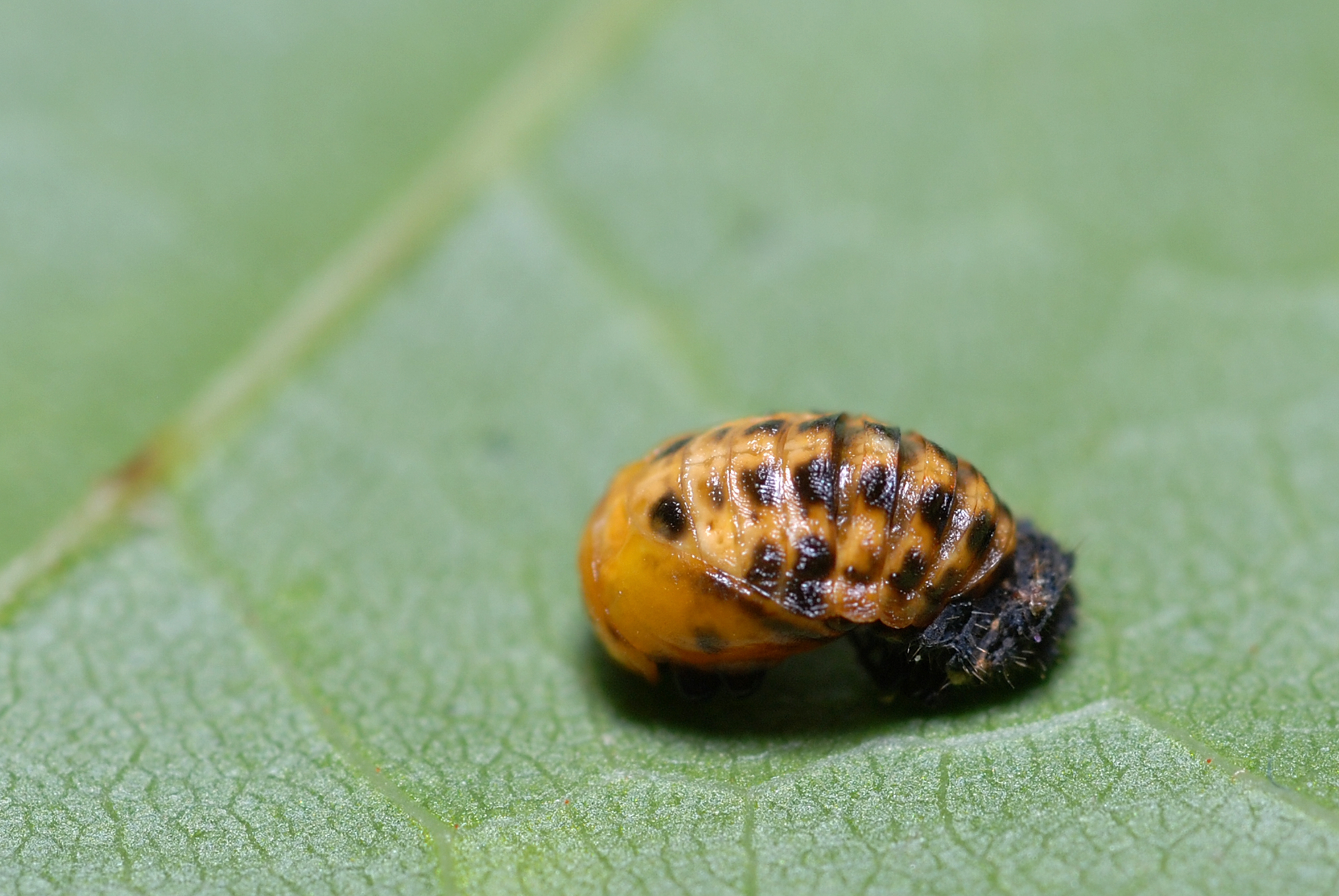 Coccinella hieroglyphica pupa